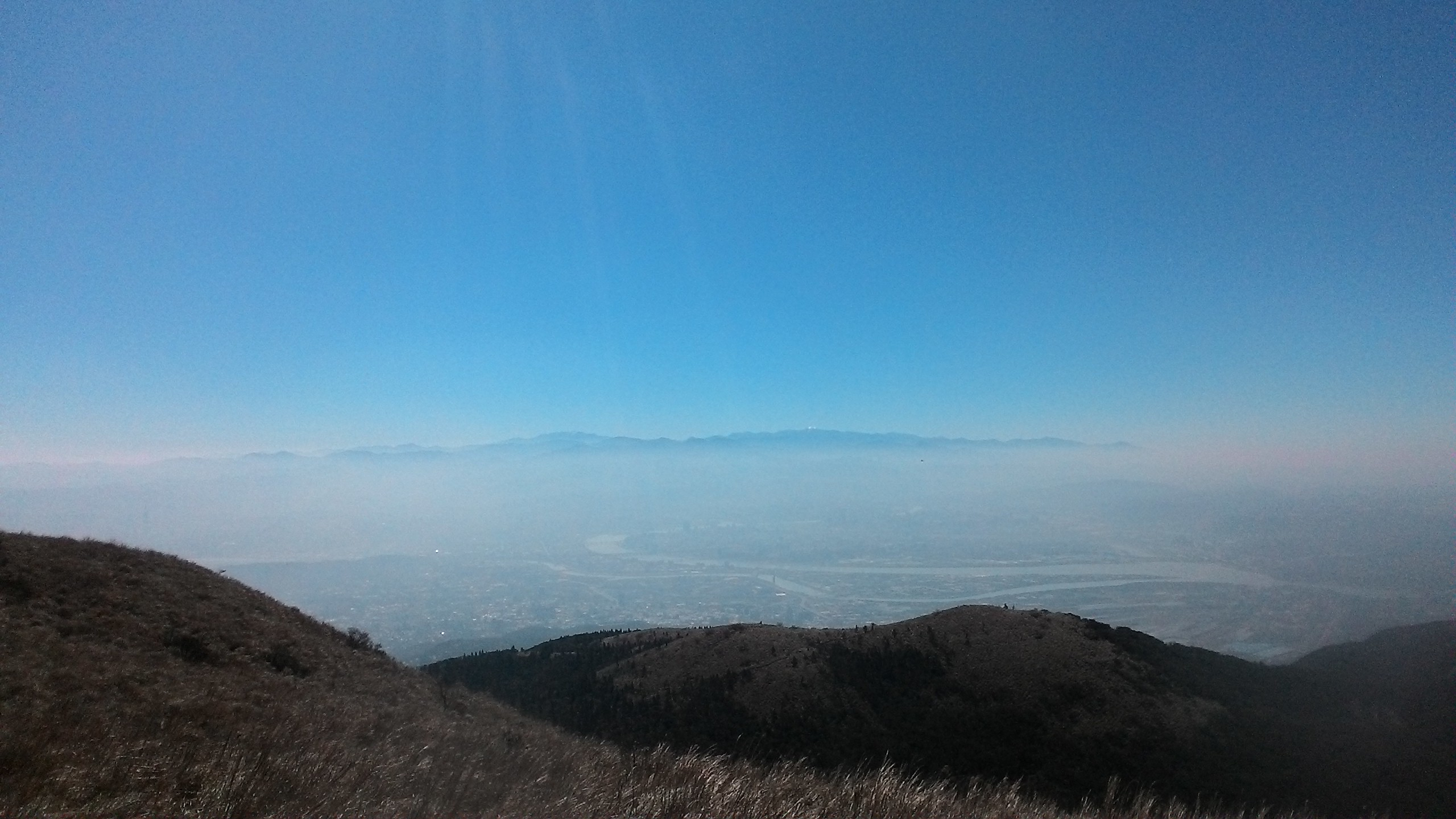 能見度好又未被雲遮敝時，大屯山可見雪山，南湖大山。